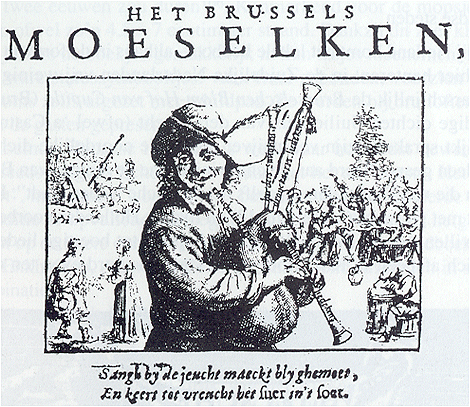 La gravure en frontispice représente un villageois jouant de la cornemuse dessiné dans le style de David Teniers le jeune. Les quatre tuyaux de la cornemuse symbolisent les quatre sections du recueil : les chansons d’amour, les pastorales, les chansons à boire et les chansons burlesque.